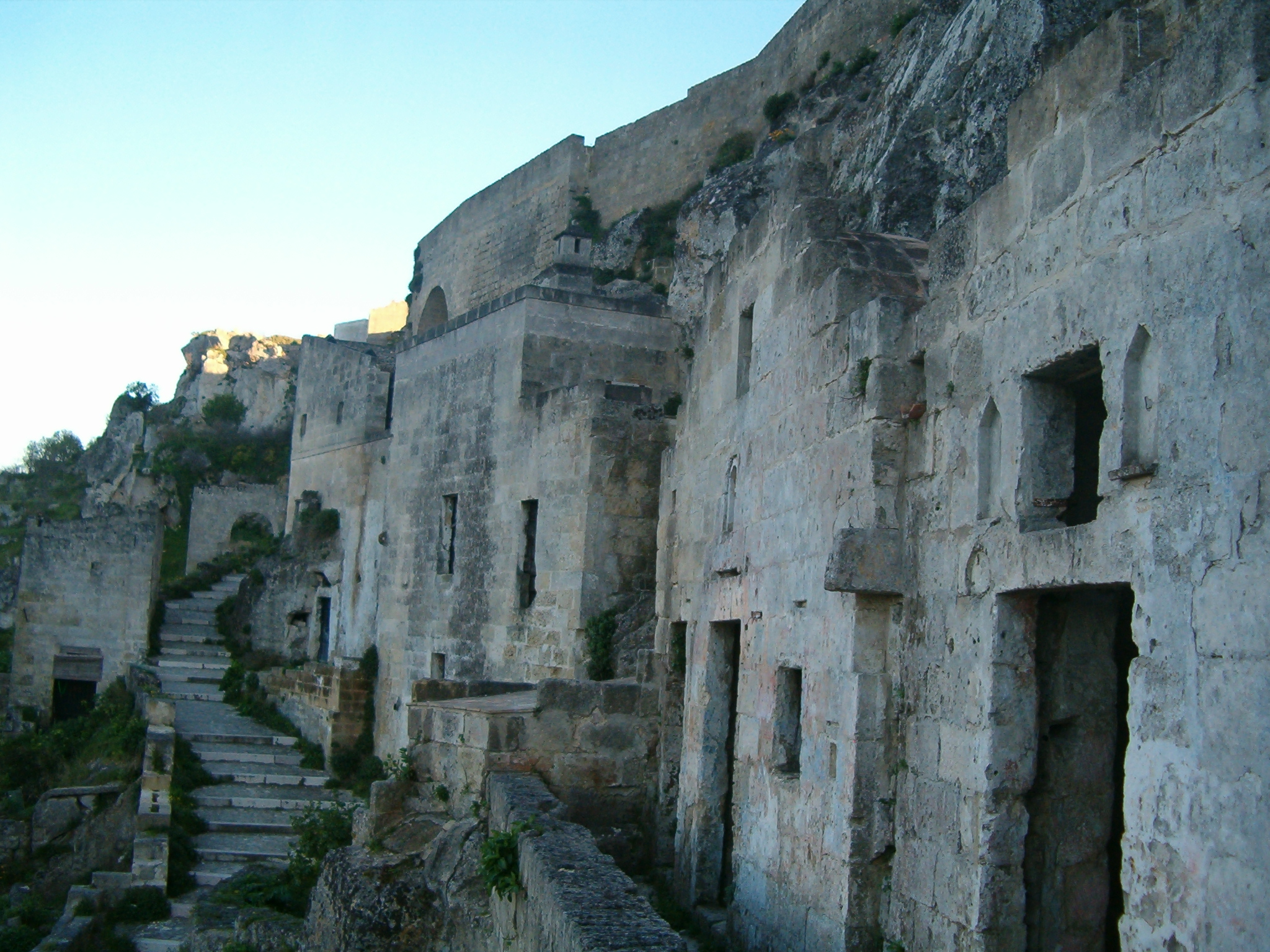 Sassi di Matera (Italy)